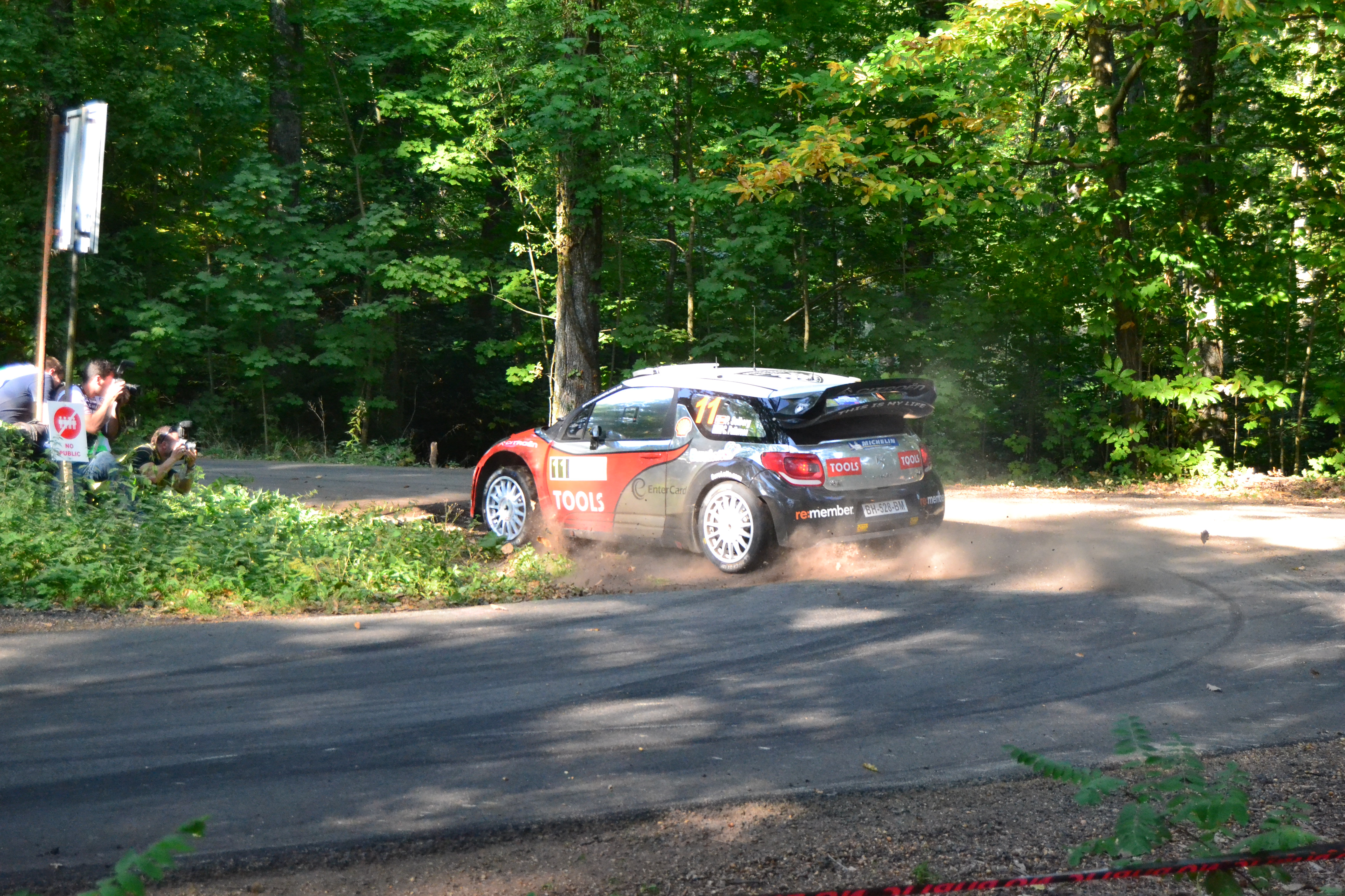 Rallye WRC France 2011, ES16 Grand Ballon. Citroën DS3 WRC - Petter Solberg/C. Patterson